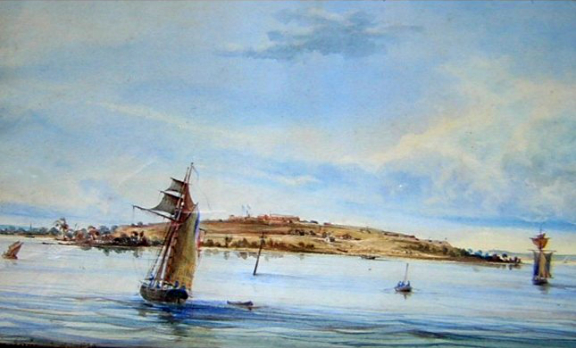 Vista de la Isla Martín García (Acuarela)